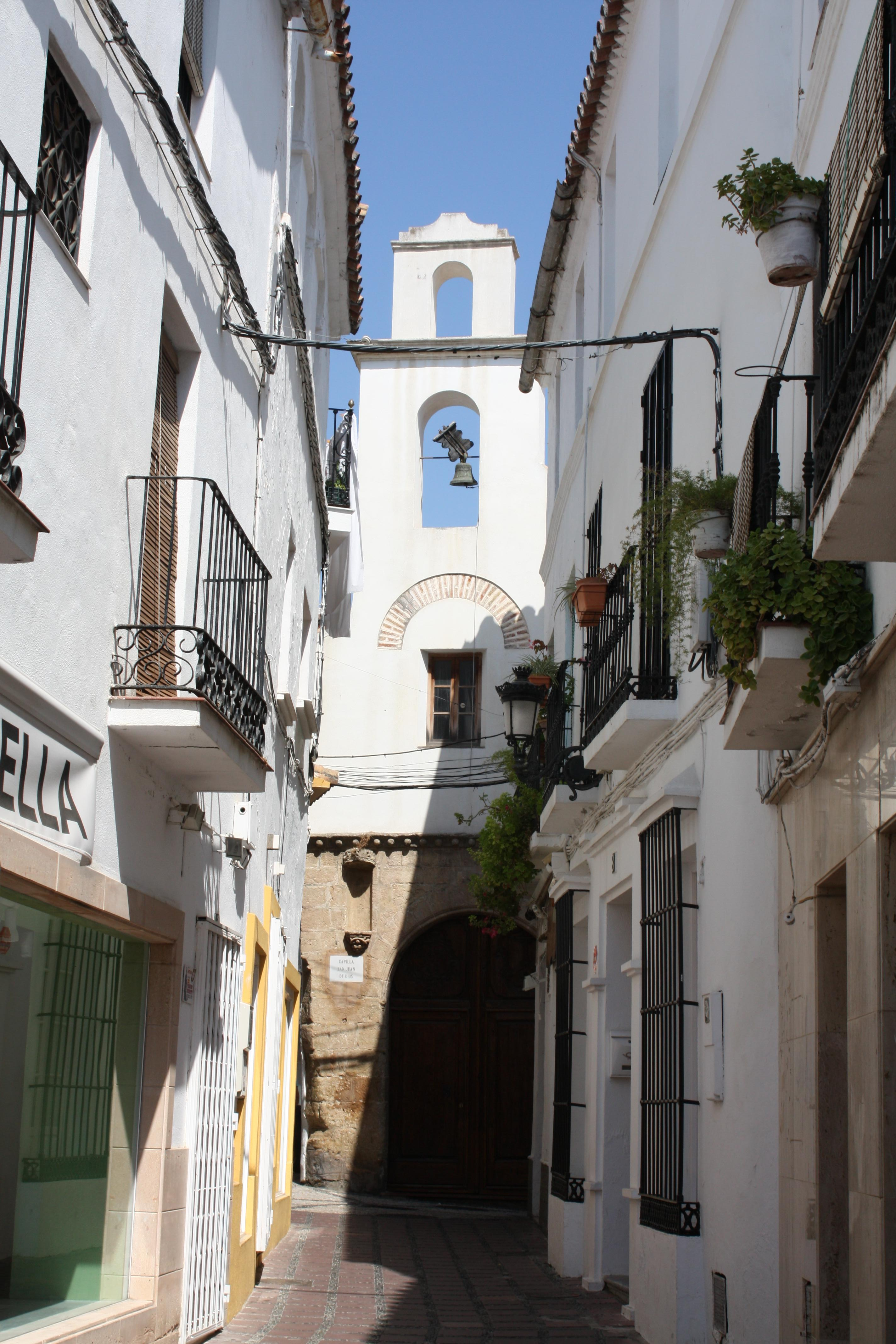 Capilla de San Juan, Marbella, España